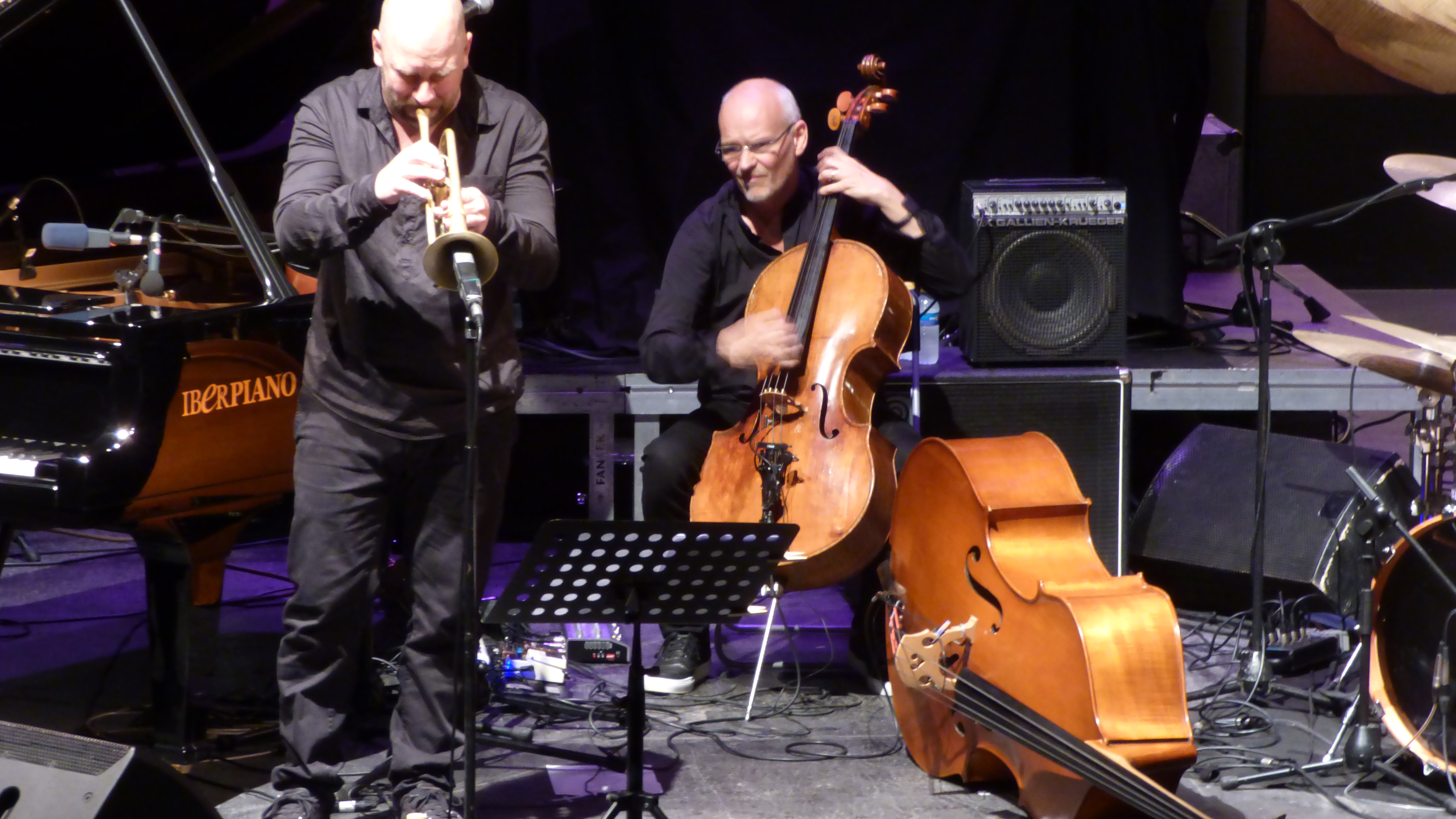 Lars Danielsson New Quintent, actuación en la XIX edición del Festival Internacional de Jazz de San Javier, 1 de julio de 2016